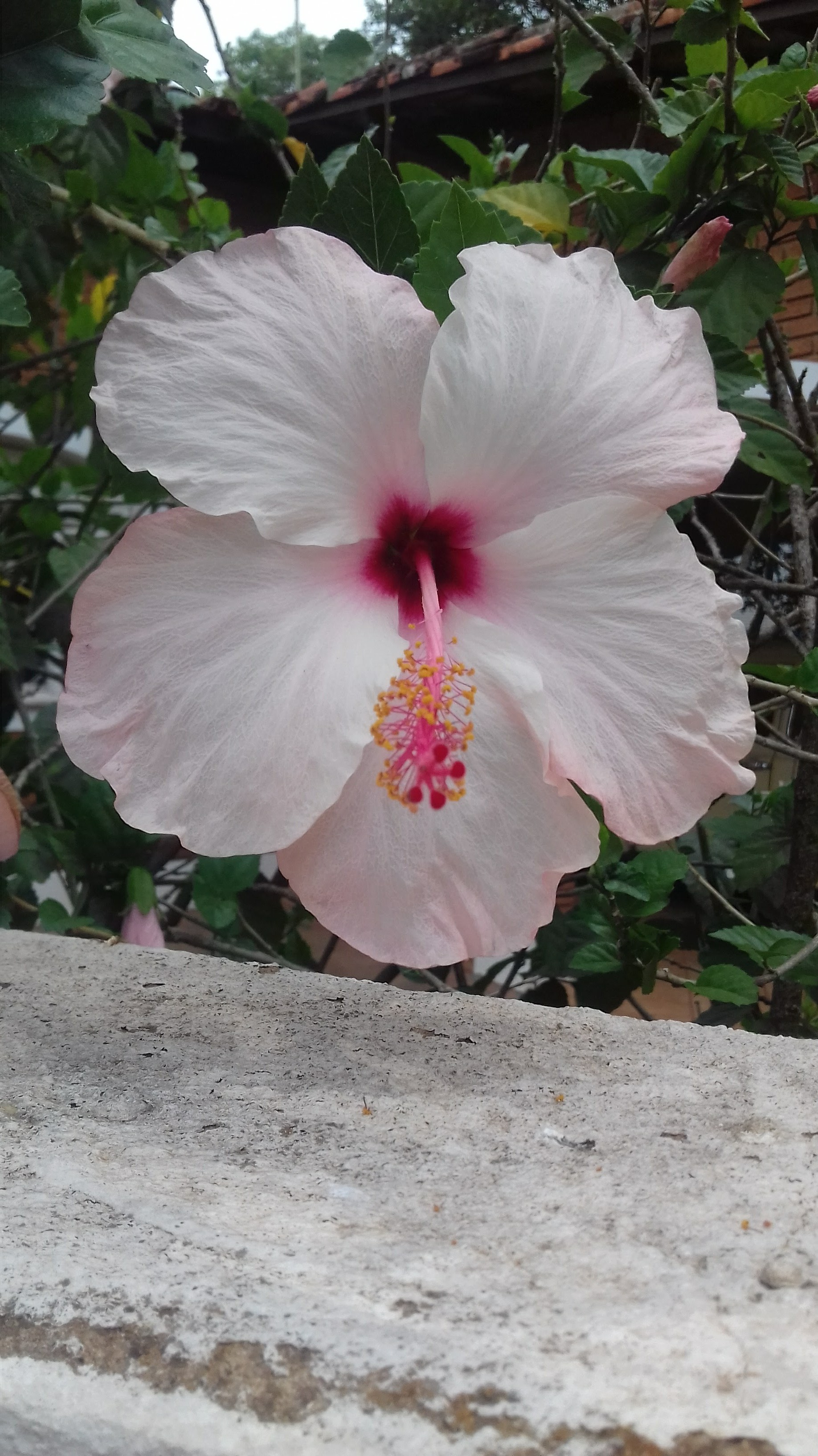 Flor com folhas alternas, cálice pentâmero verde e corola pentâmera, gamopétala rosa.